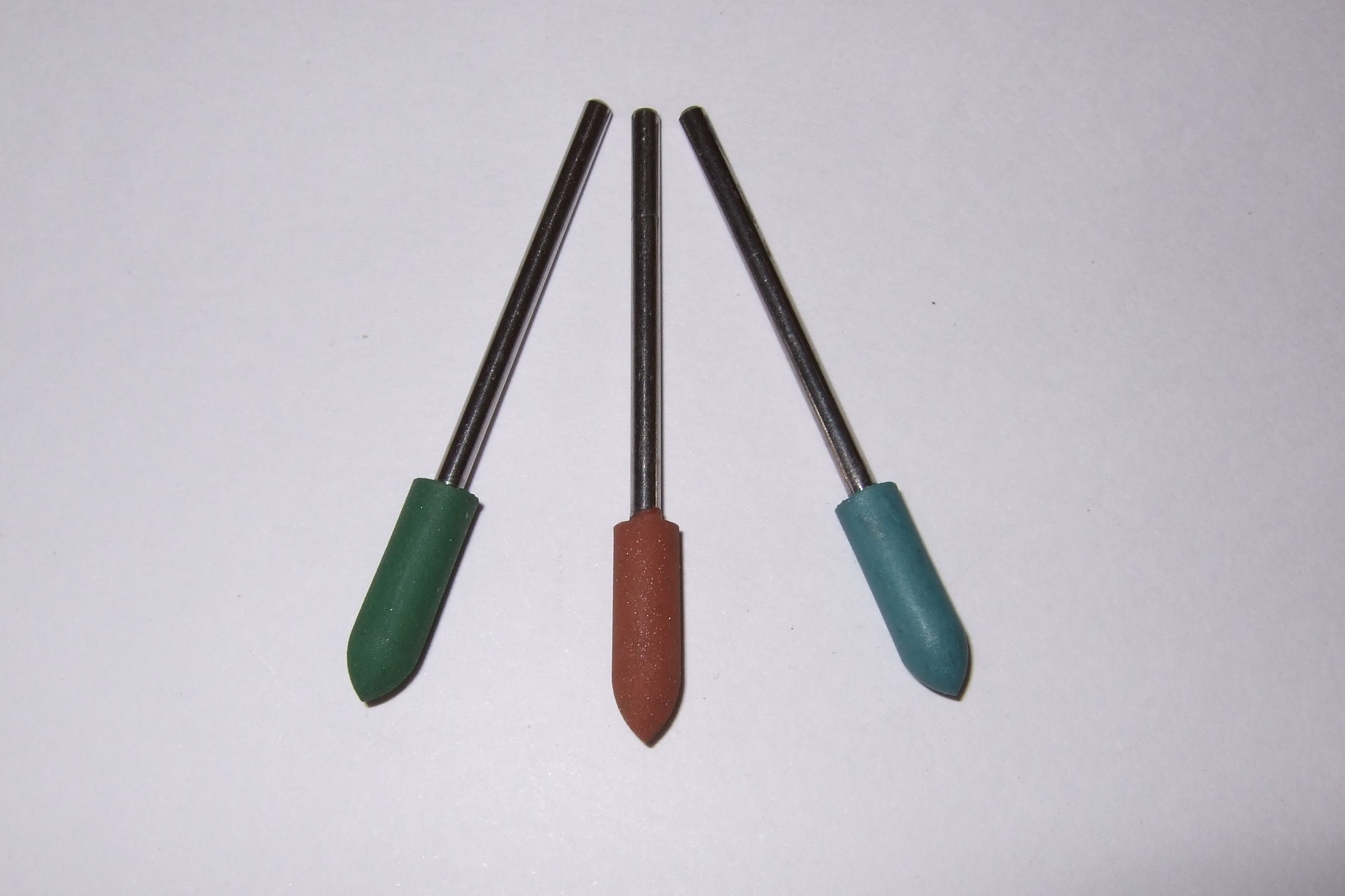 Chhiūⁿ-ni phau-kng-lia̍p, kim-sio̍k ēng